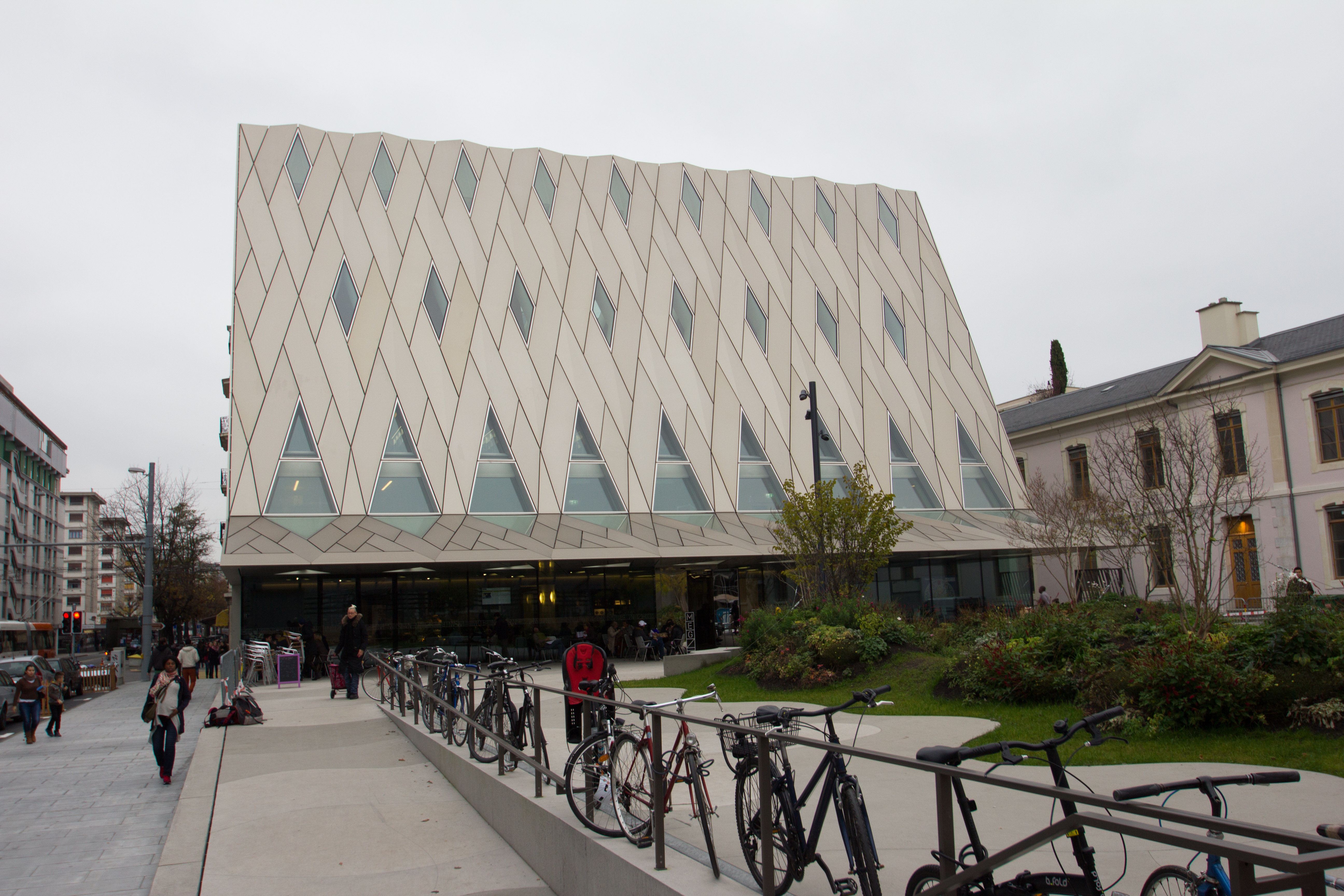 Nouveau bâtiment du Musée d'ethnographie de Genève.